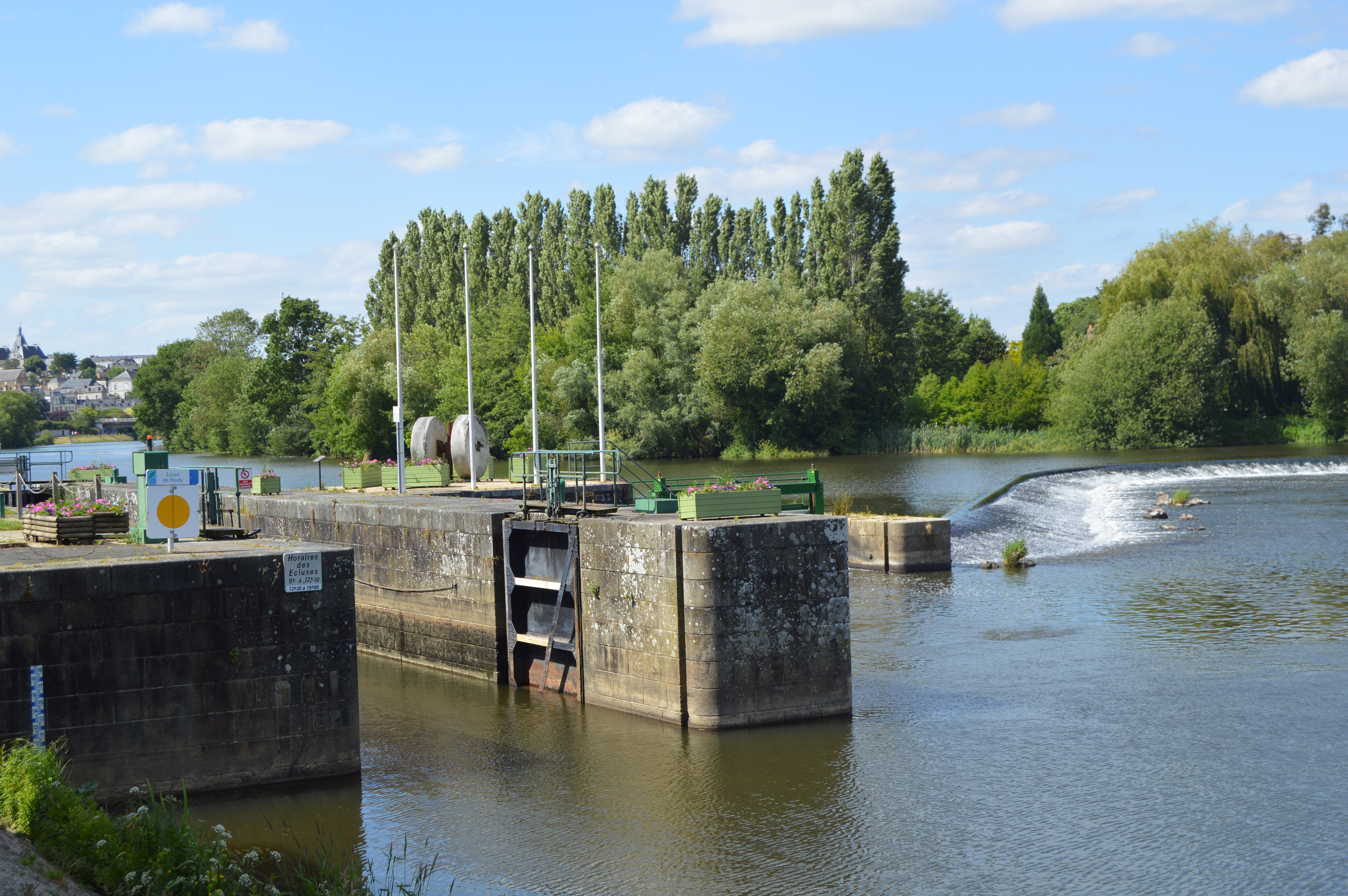 Ecluse de Pendu